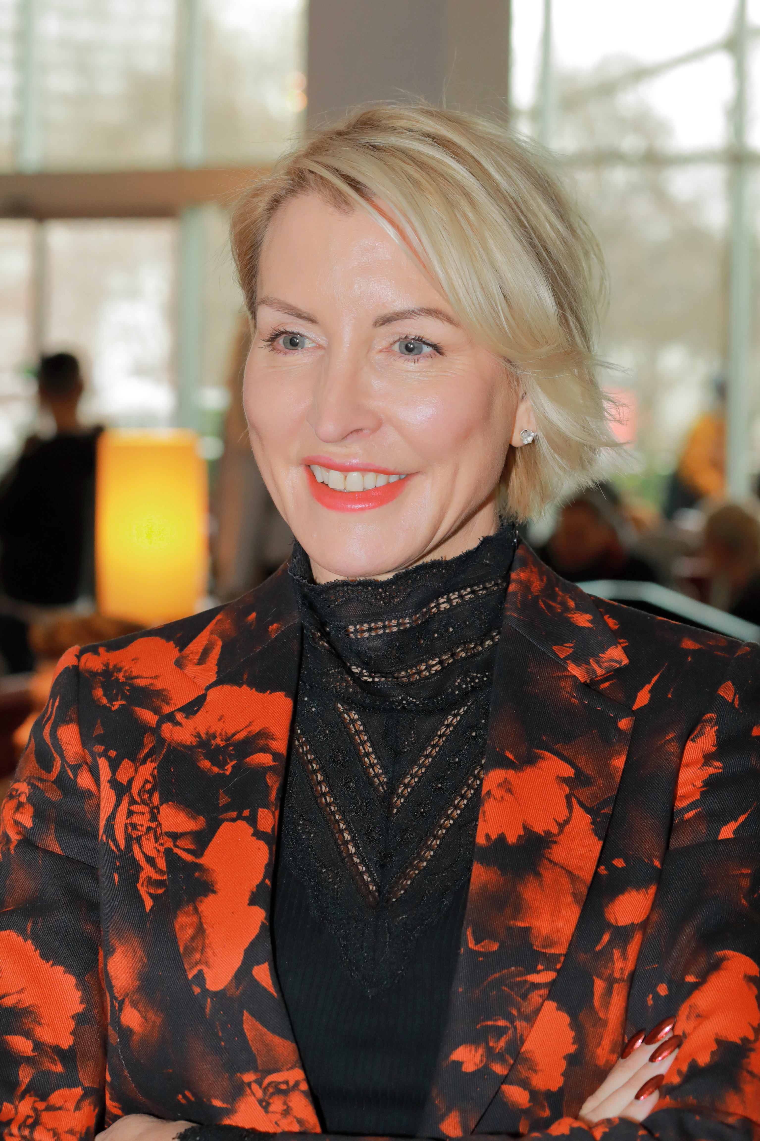 Die britische Unternehmerin und ehemaliges Model, sowie Ex-Ehefrau von Paul McCartney Heather Mills auf dem „Weihnachtsmarkt vegan“ im Hotel „ARCOTEL Kaiserwasser“ in Wien.